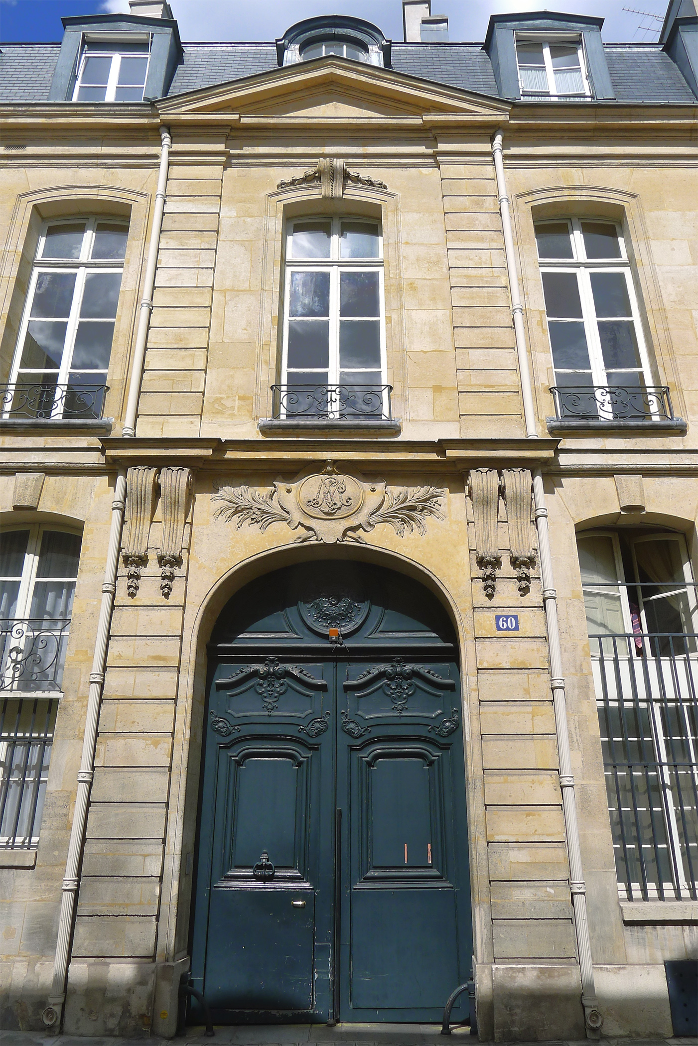 Hôtel du Prat ou Duprat (n°60 rue de Varenne) - Paris VII .